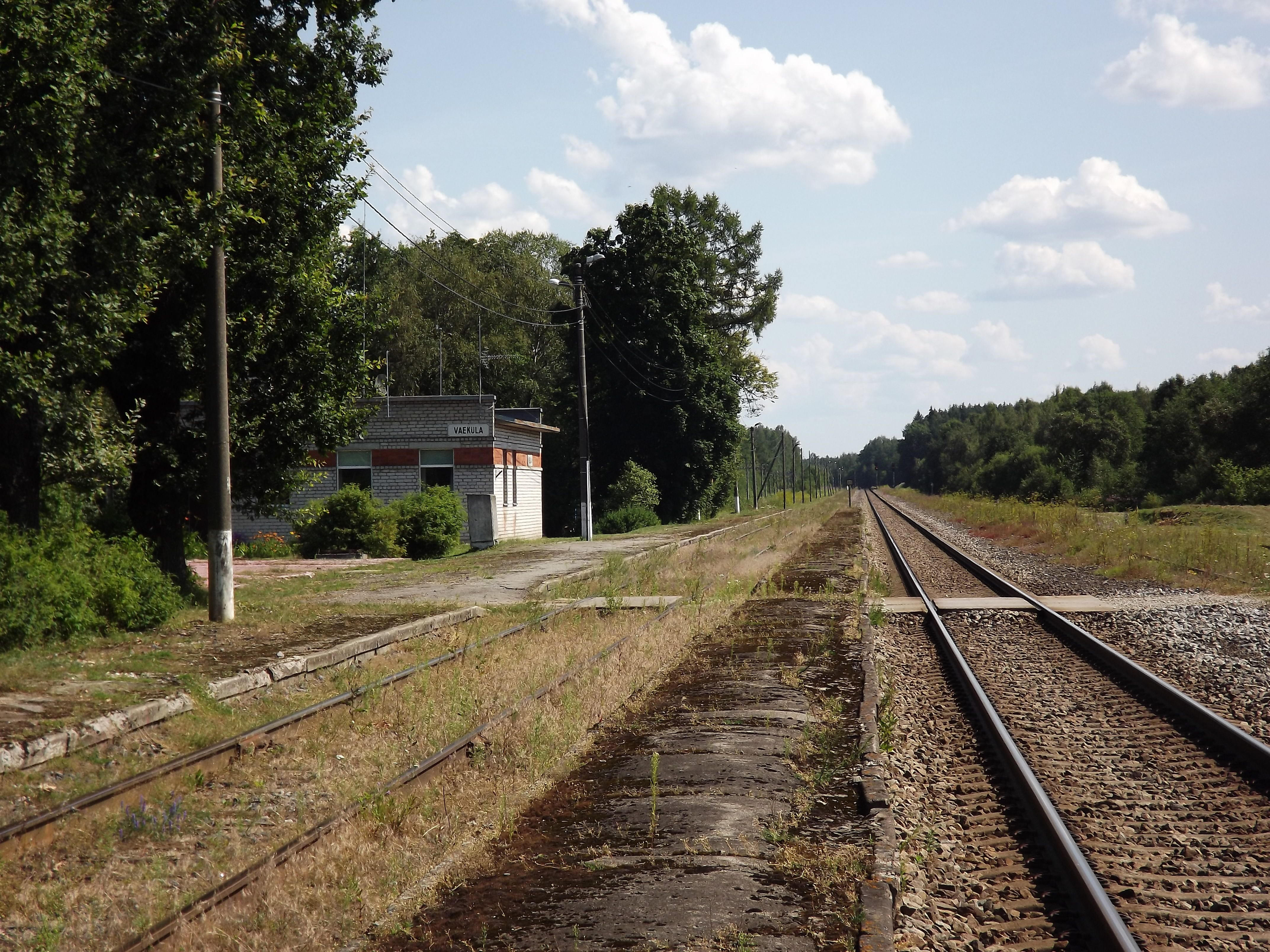 Vaeküla raudteejaam